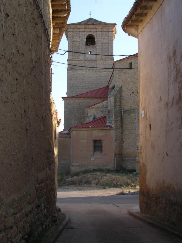 Fotografía de es::es:Usuario:Rapomon cedida a la Wikipedia bajo la siguiente licencia: Categoría:España (imagen)